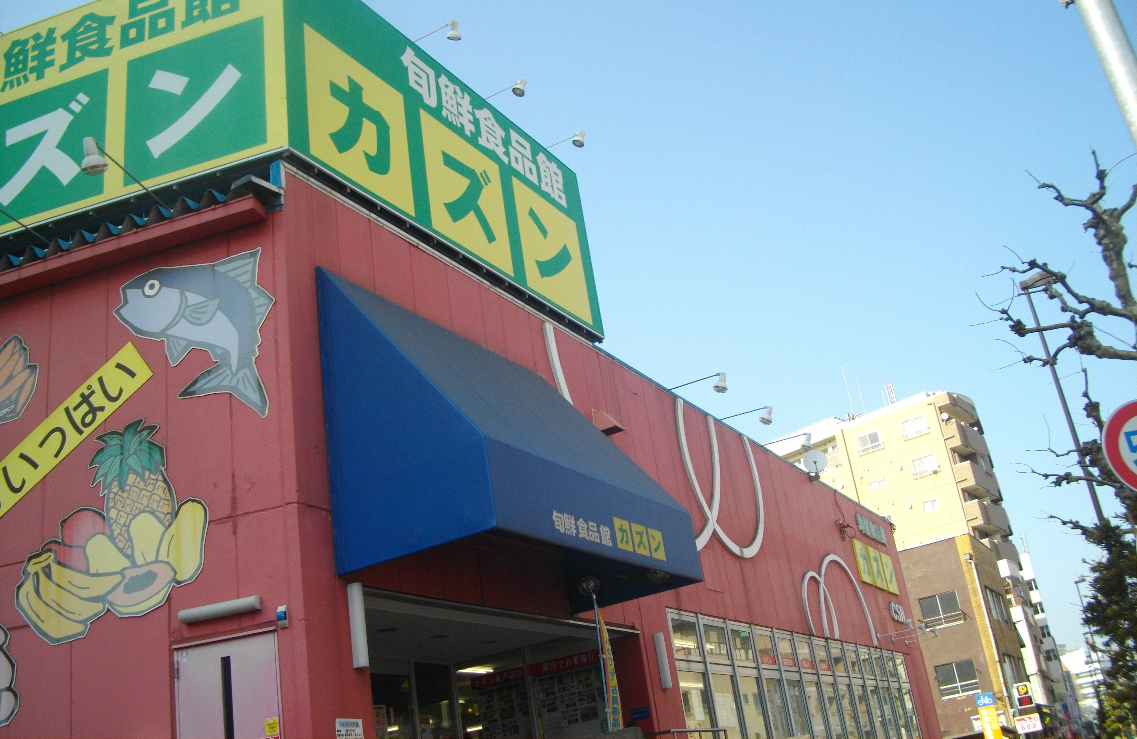 東京都江東区亀戸にあるスーパーマーケット「カズン」亀戸店(本店)の写真。「カズン」は東京都区部の東部を中心に立地展開するスーパーマーケットである。